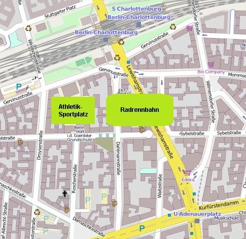 Location of former Sportpark Kurfuerstendamm in Berlin-Charlottenburg